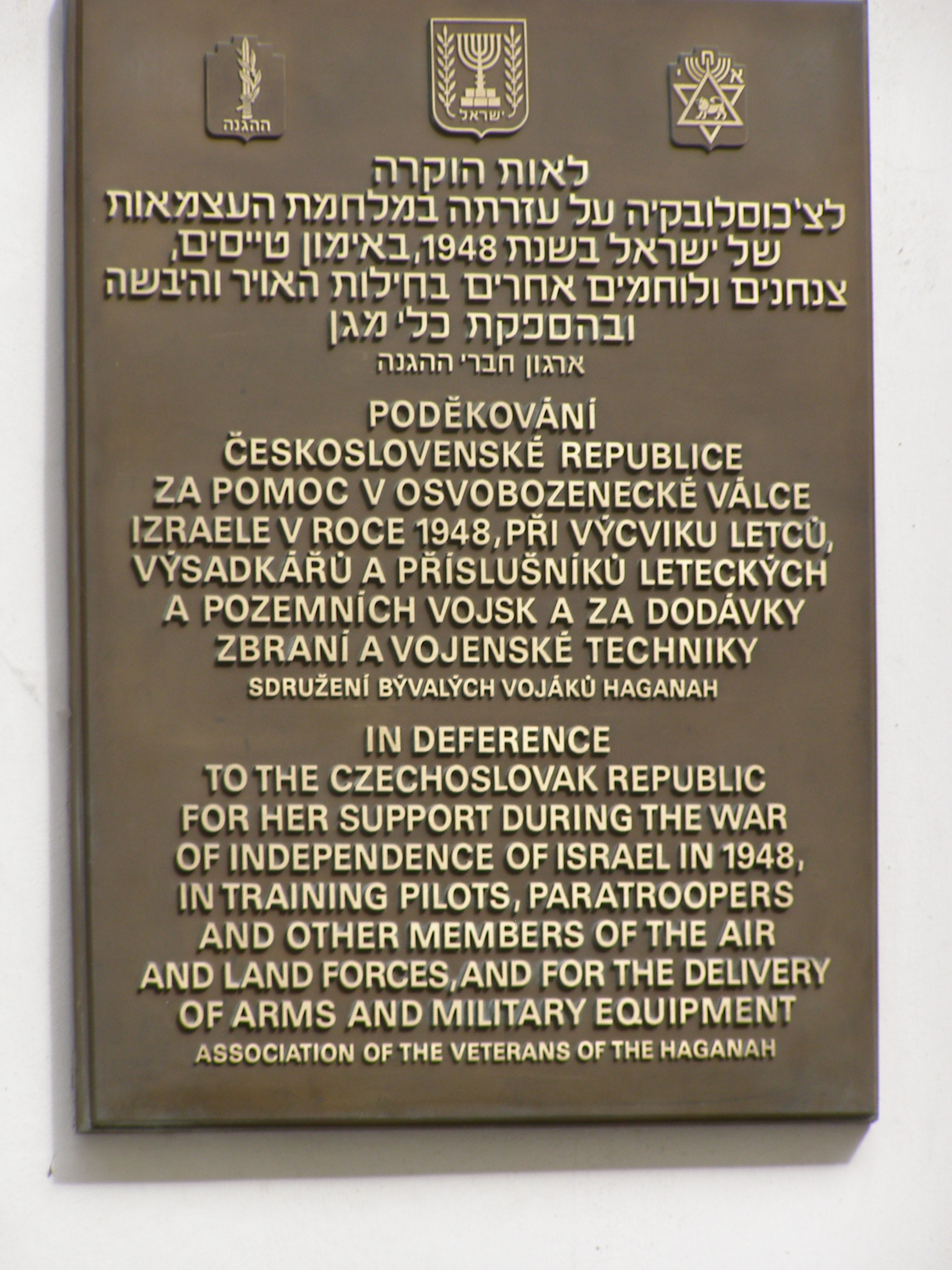 Gedenktafel für die Hilfe der Tschechoslowakei für Israel im Unabhängigkeitskrieg 1948; Maiselova ulice 18/250, Praha 1 Josefov